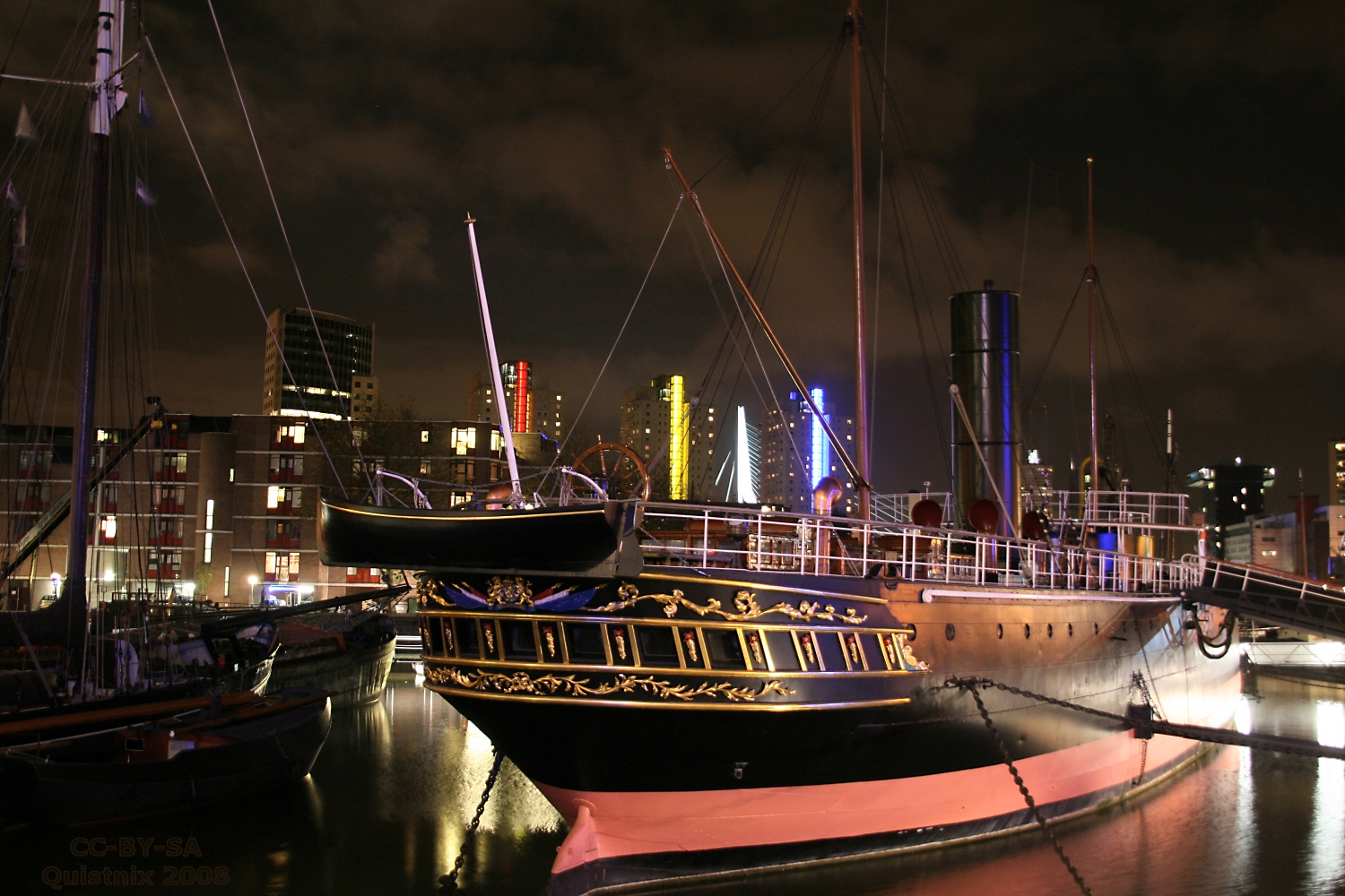 Rotterdam: Leuvehaven - museumschip Zr. Ms. Buffel bij nacht